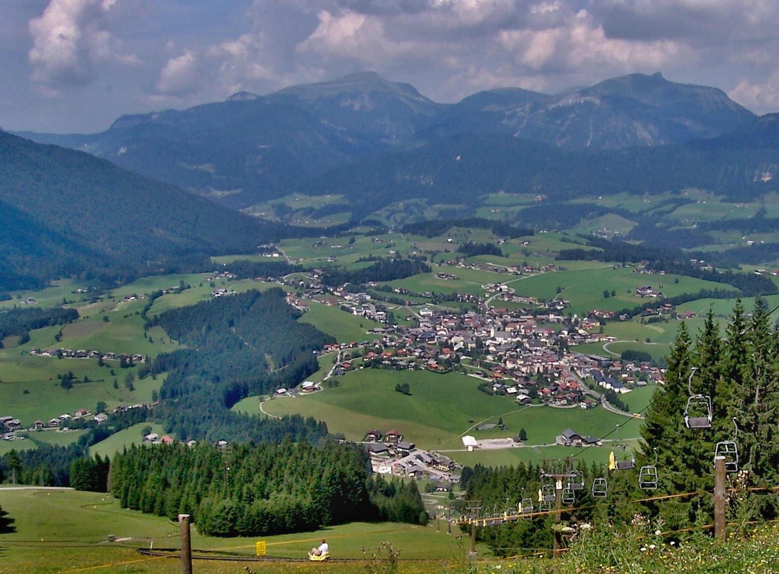 Abtenau, Salzbursko, Rakousko. Celkový pohled.